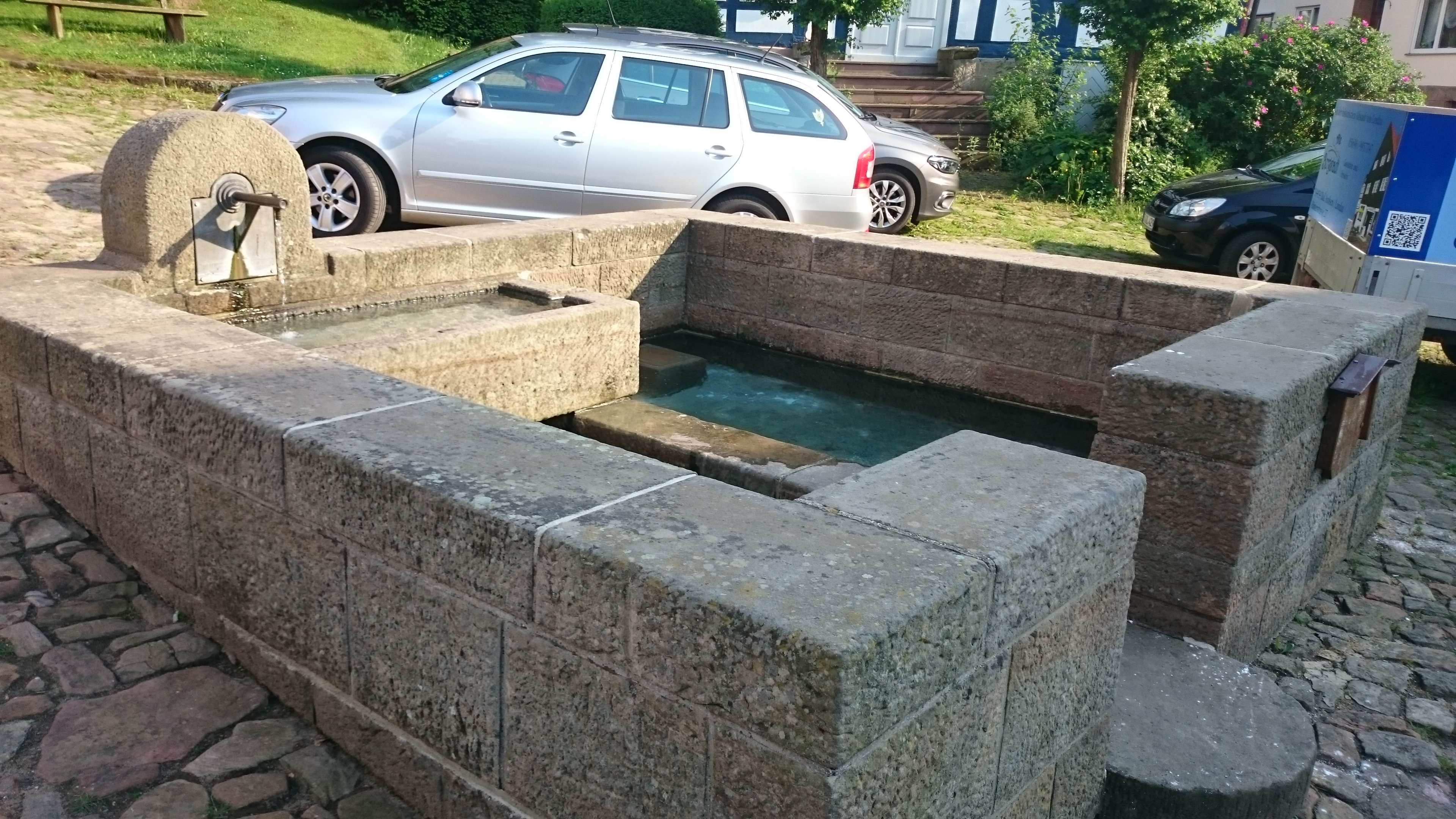 [nach Auskunft der Infotafel:] Markt-Kump - 1555 - Nachbildung 1984 Dorferneuerung - Erste gefasste Trinkwasserstelle Landaus. Damals wie heute gespeist von der histor. Wasserkunst 63 m tiefer am Fuße der Bergstadt. - In der Folgezeit weitere Kümpe im Stadtgebiet. Nicht mehr erhalten. - Alte Tafeln hat E. Thetz angefertigt, M. Kramer gestaltet & beschriftet. 2007 renoviert, Schrift z.T. geändert u. eingebrannt. S. Neubert, für meine Heimatstadt u. auf Wunsch der "Landliebe"